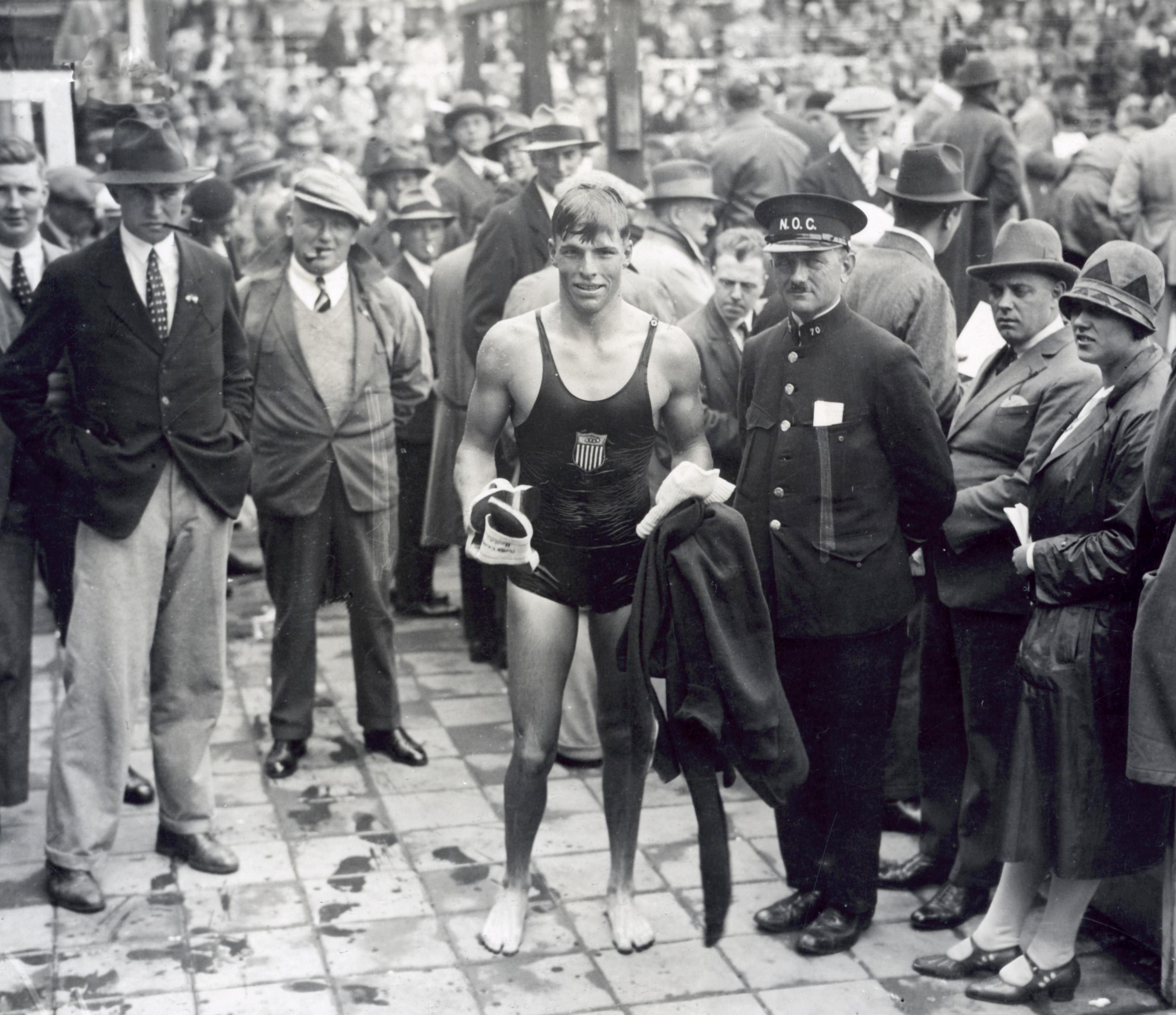 Sport. Olympische Spelen Amsterdam 1928. Zwemmen, heren : De Amerikaan Clarence 'Buster' Crabbe, die derde werd op de 1500 m